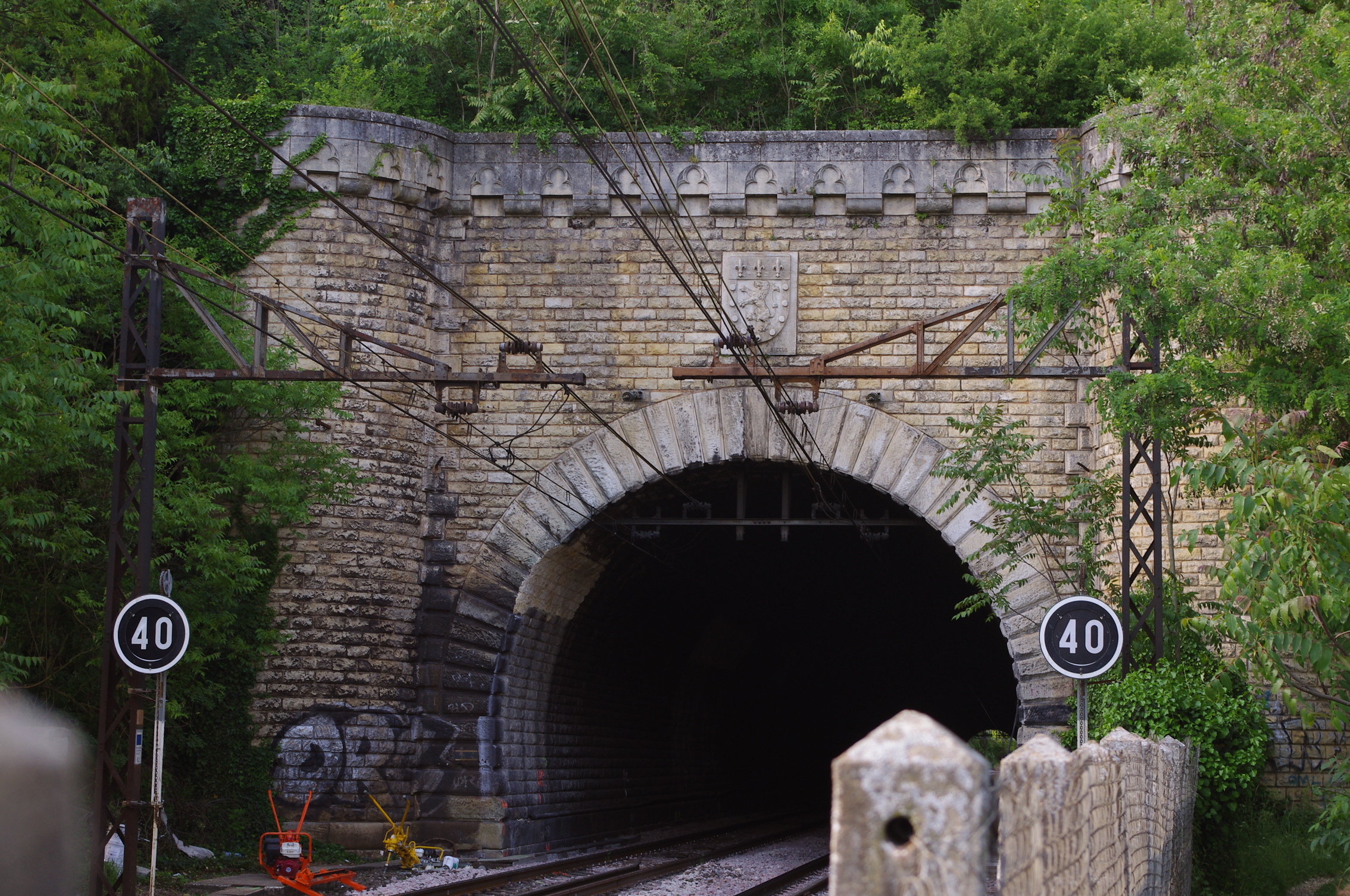 tunnel du chemin de fer, traversant la falaise à la Madeleine, Poitiers. Construit au XIXe siècle.